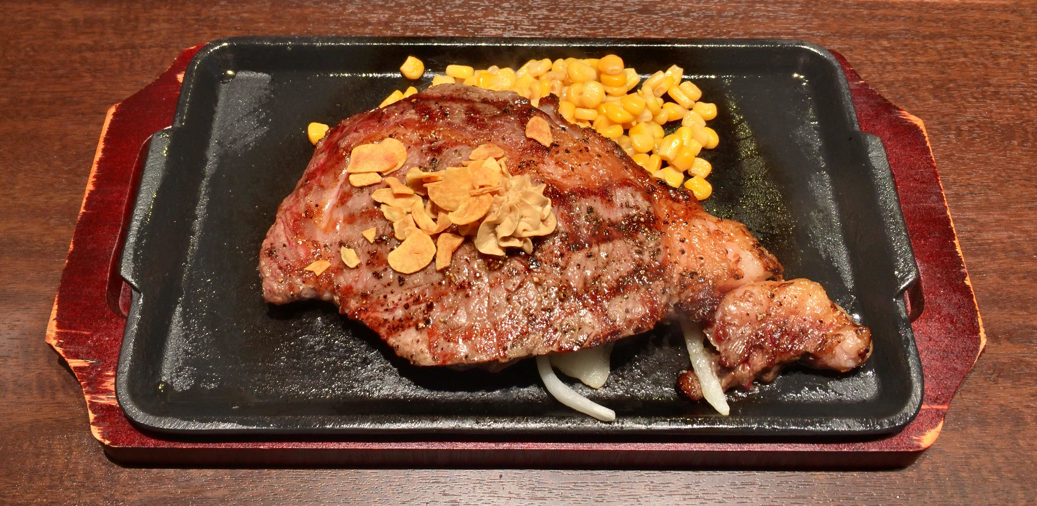 いきなり!ステーキのリブロースステーキ（300g）